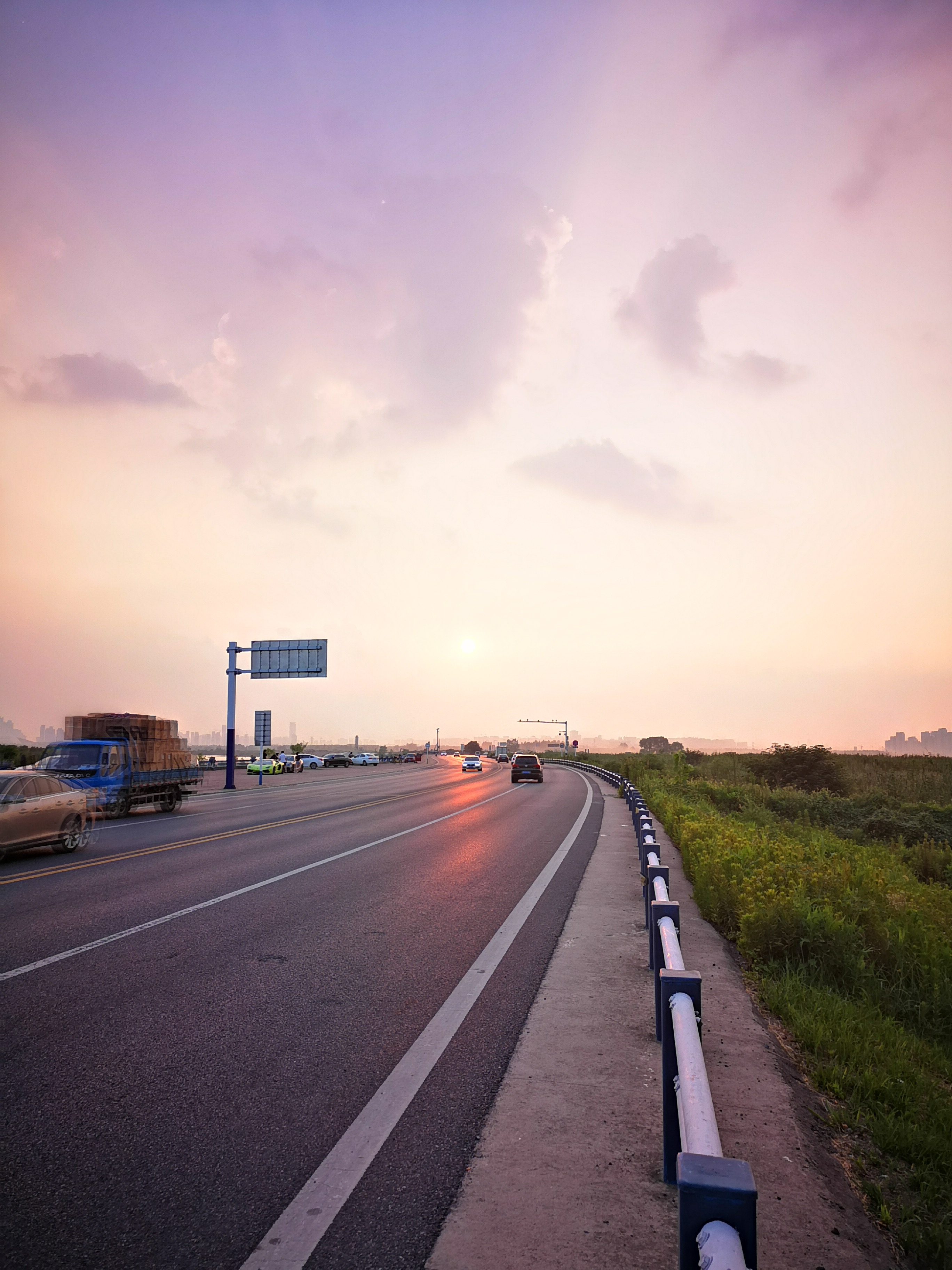 中文（中国大陆）: 环巢湖旅游大道